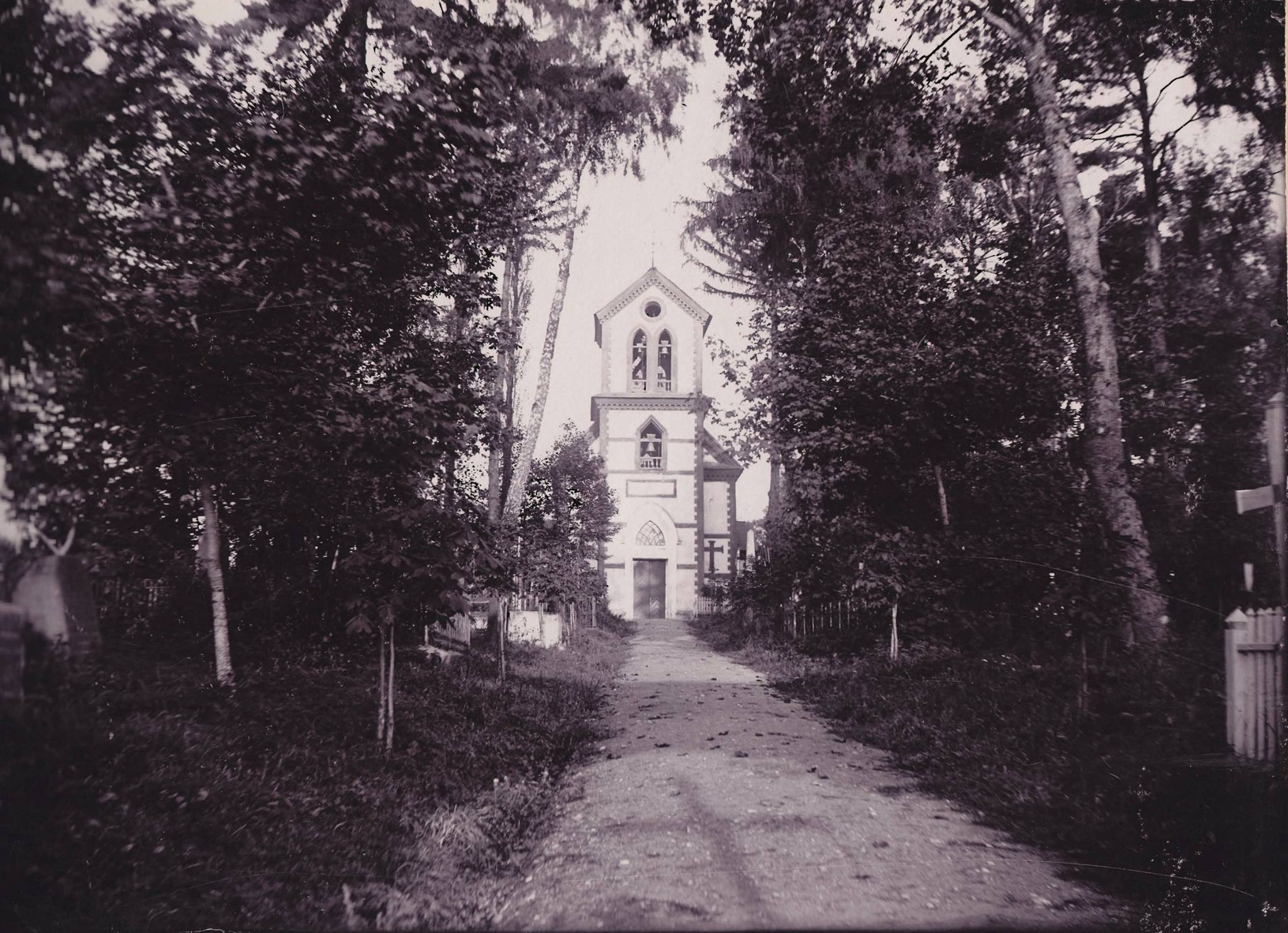 Беларуская (тарашкевіца): Менск (Miensk), Кальварыя (Kalvaryja). Касьцёл Узвышэньня Сьвятога Крыжа